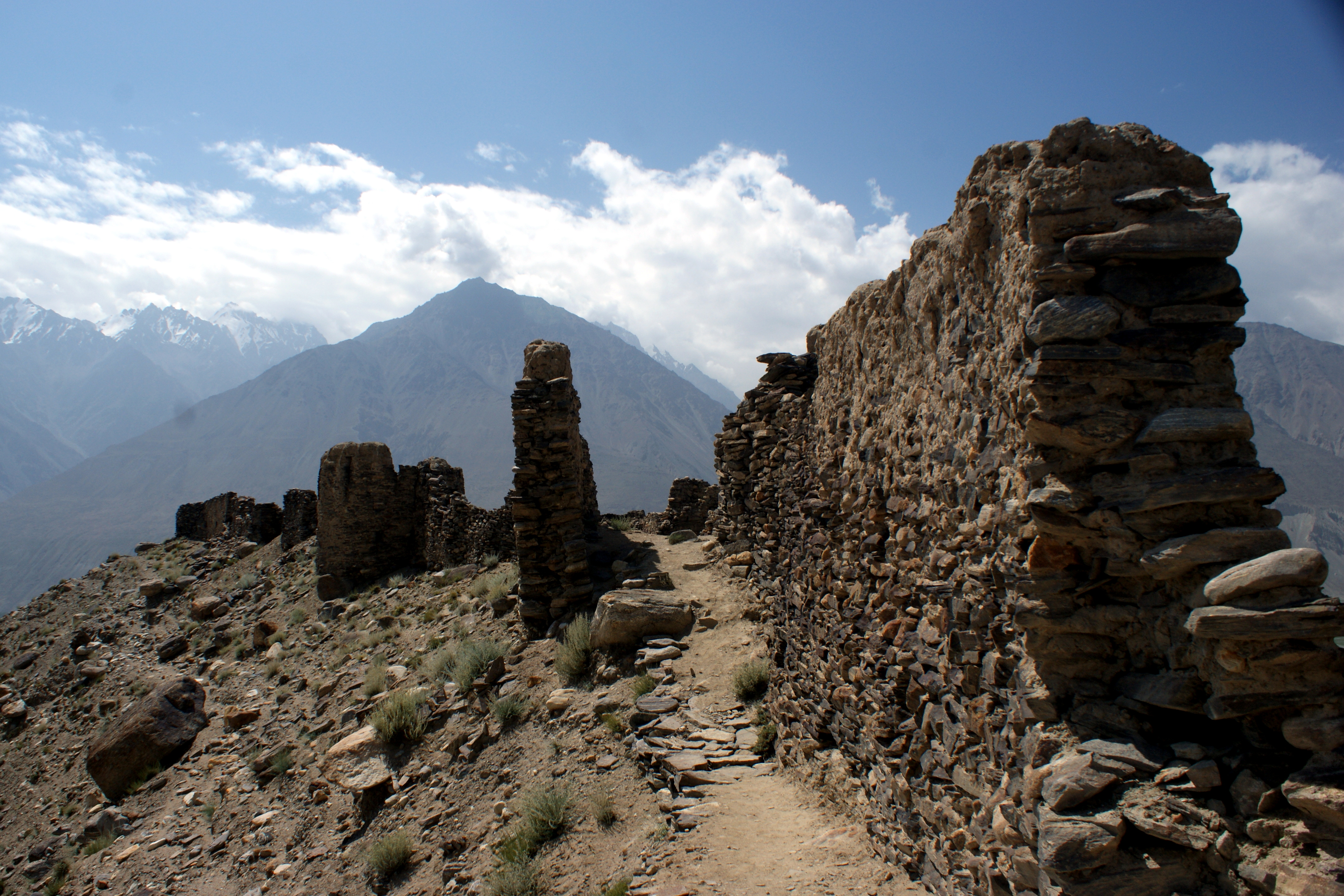 Mauern im Yamchun Fort